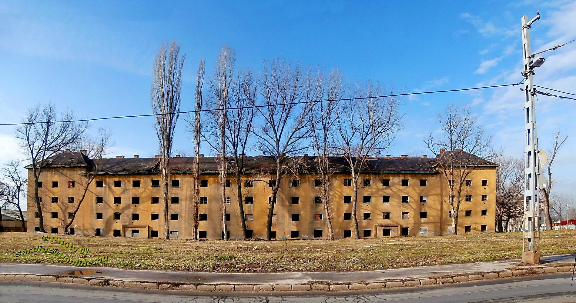 Dzsumbuj, egykori szükséglakás-telep Budapest IX. kerületében, az Illatos út és a Gubacsi út sarkánál